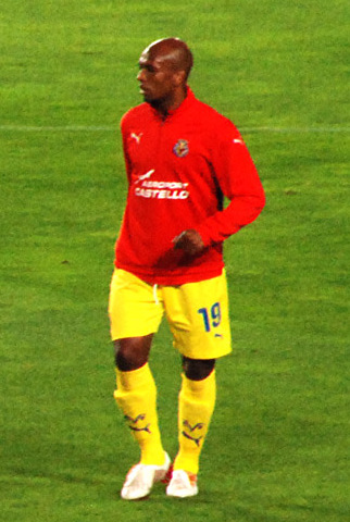 Partido Espanyol-Villareal.